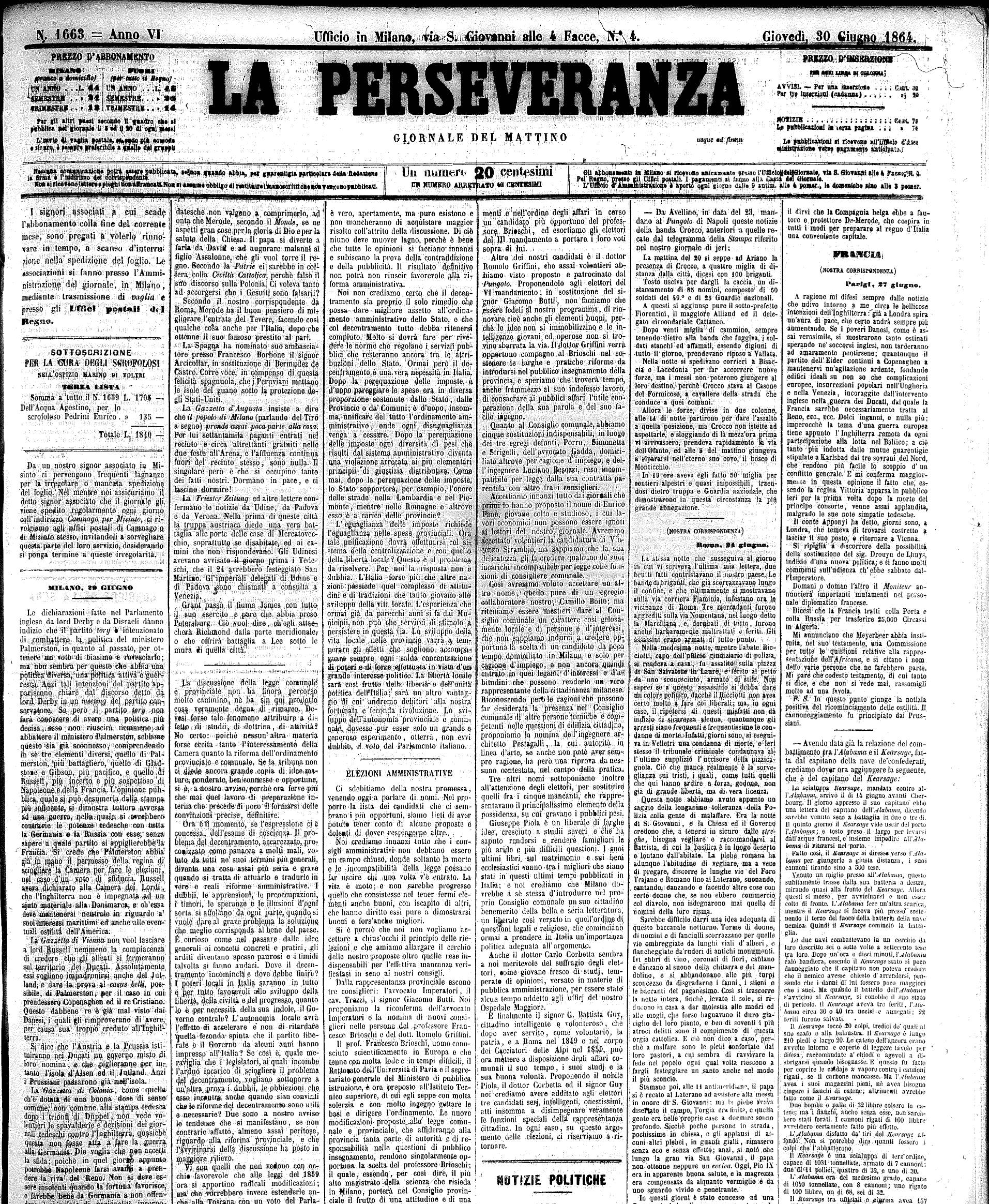 Una pagina de "La Perseveranza", N. 1663, Anno VI